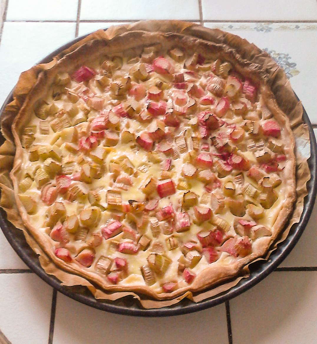 Tarte à la rhubarbe